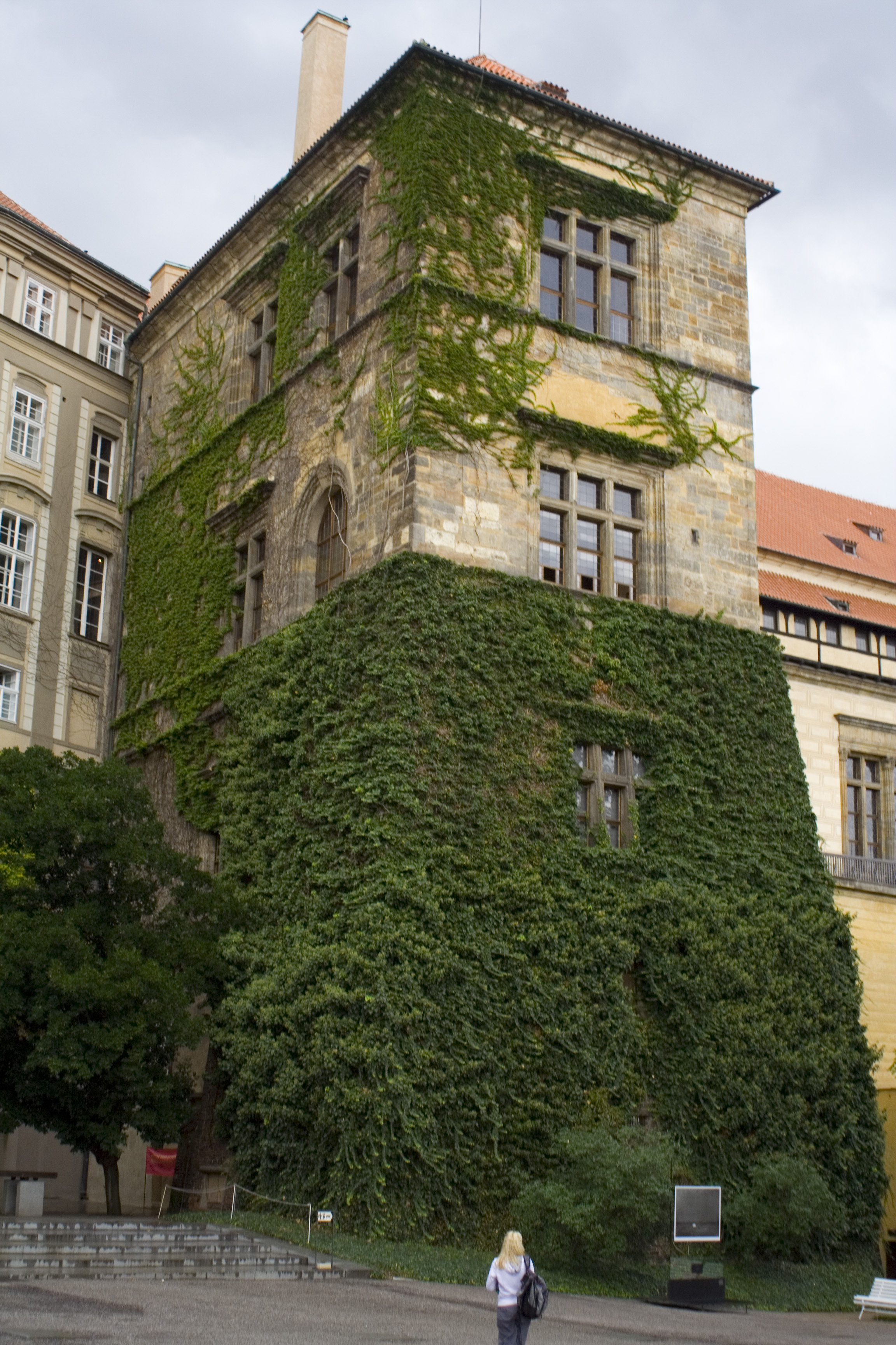 Pražský hrad, Starý královský palác, Ludvíkovo křídlo, pohled ze zahrady Na Valech